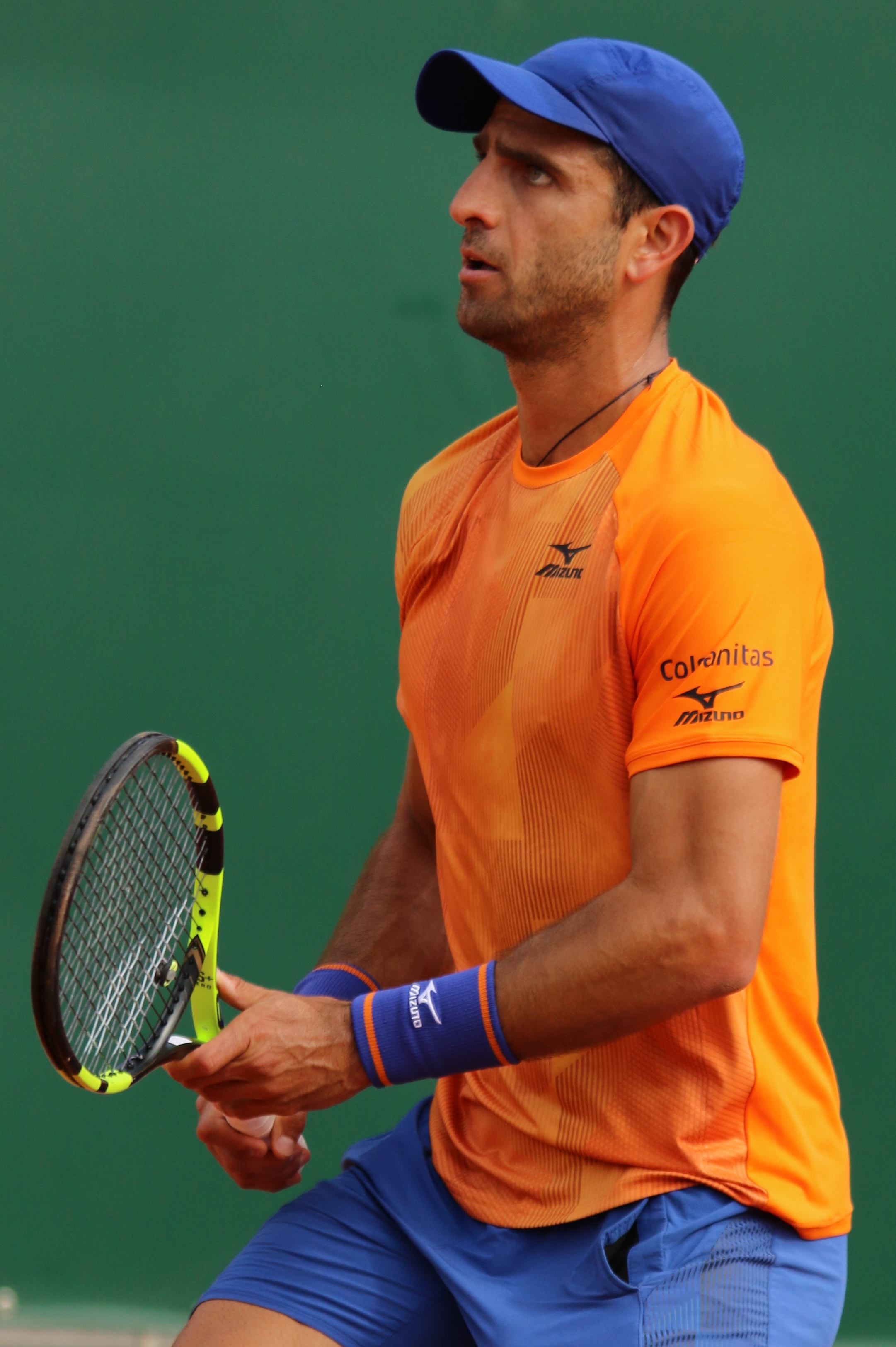 Farah RG19 (24)